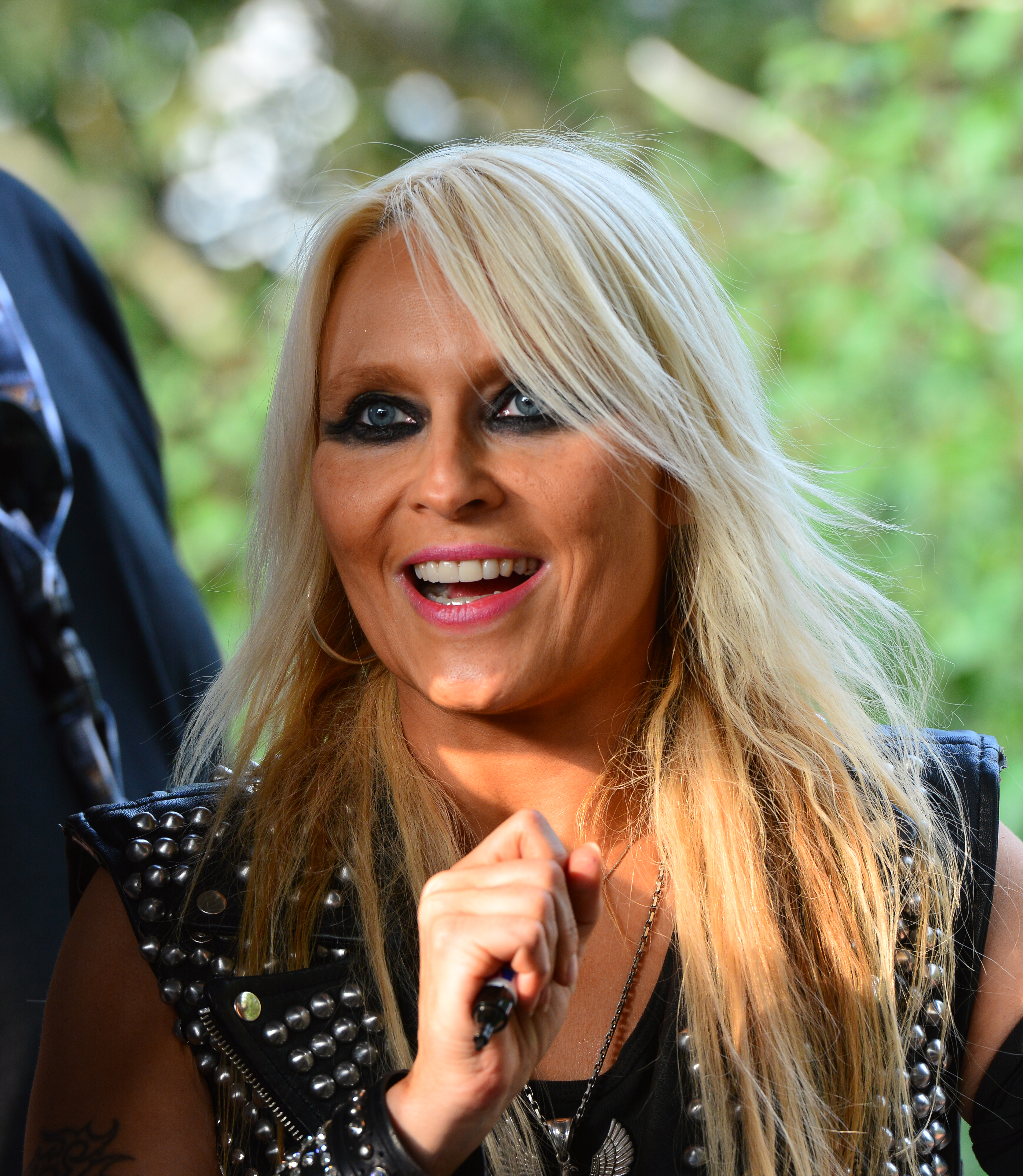 Doro Pesch beim Meet & Greed auf dem Wacken Open Air 2014